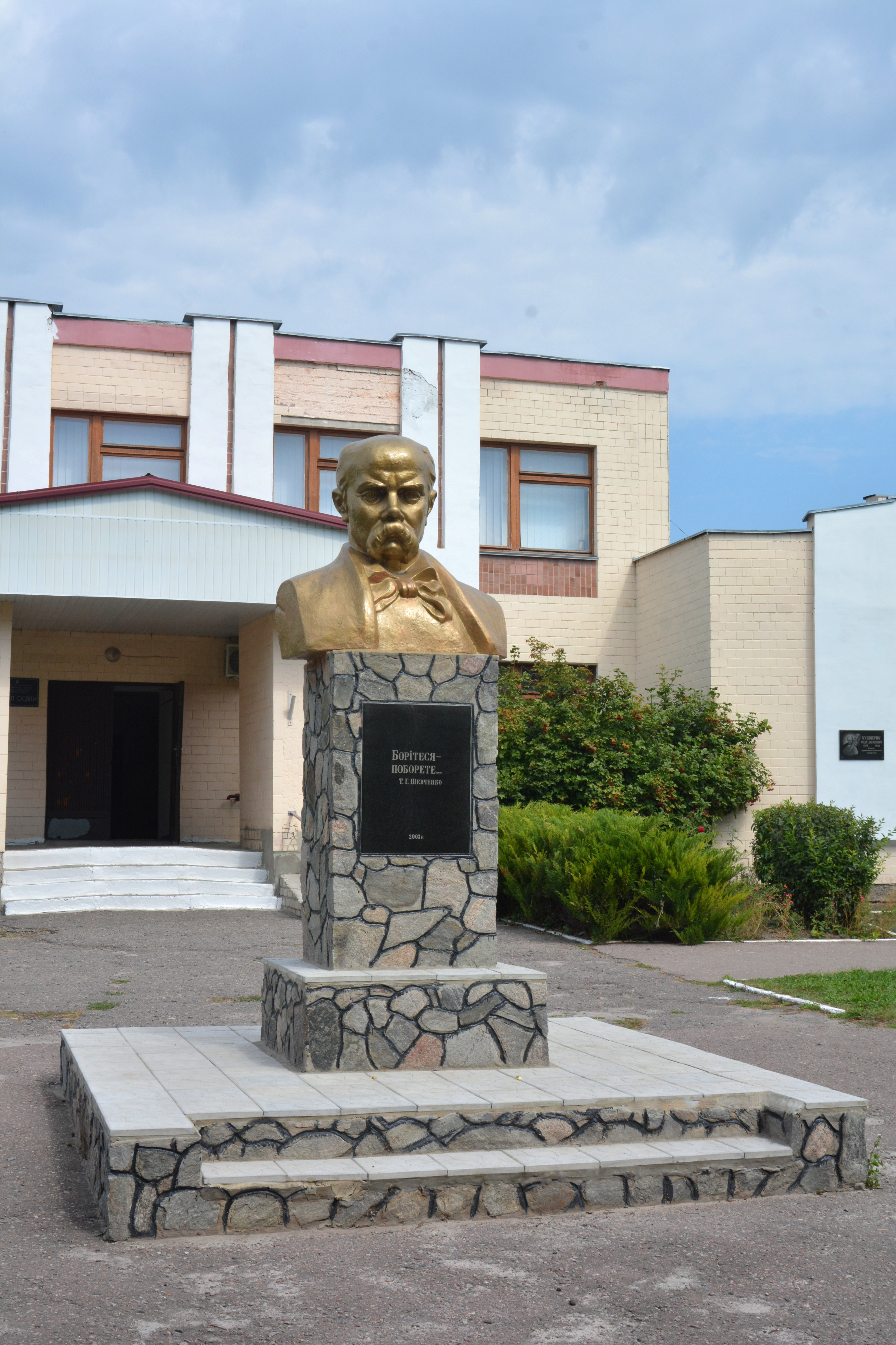 Пам’ятник-погруддя Т.Г.Шевченку., Велика Багачка смт, центр.